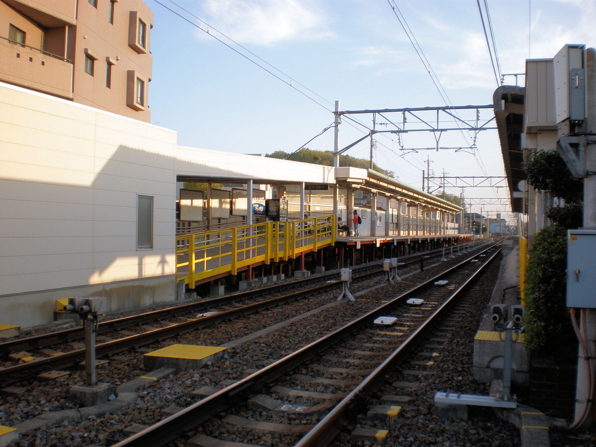 愛知県小牧市にある田県神社前駅